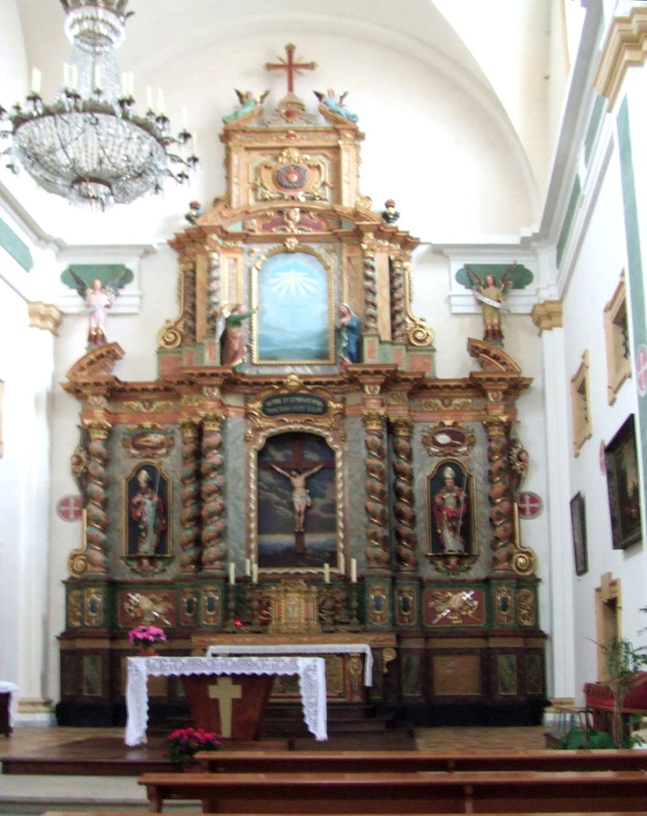 maître-autel de l'église Saint-François-de-Sales d'Annecy (France)